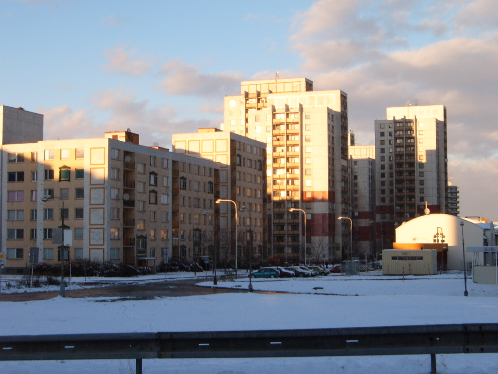 zimní odpoledne, Bělský les